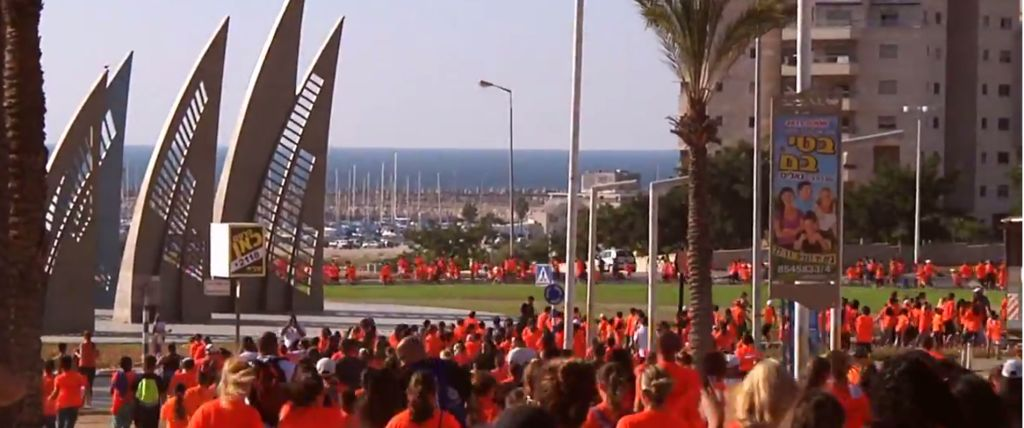 מרוץ אשדוד ה-34, 2013 Ashdod 34's race